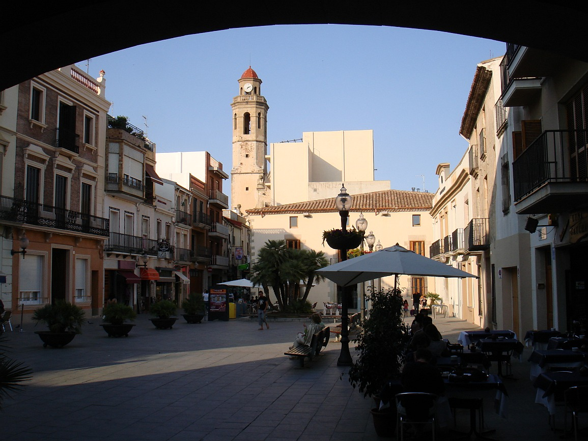 Rathausplatz von Calella